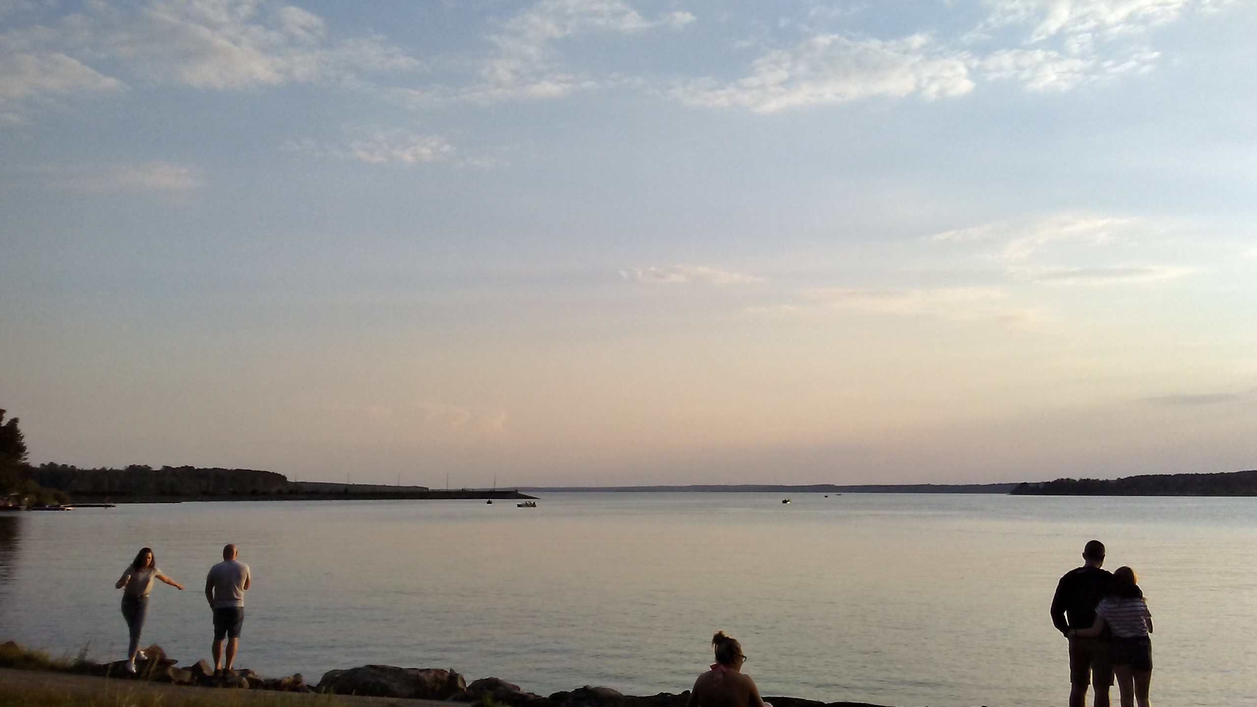 Zalew Sulejowski, widok od strony Smardzewic przy restauracji Omega, maj 2018 r.